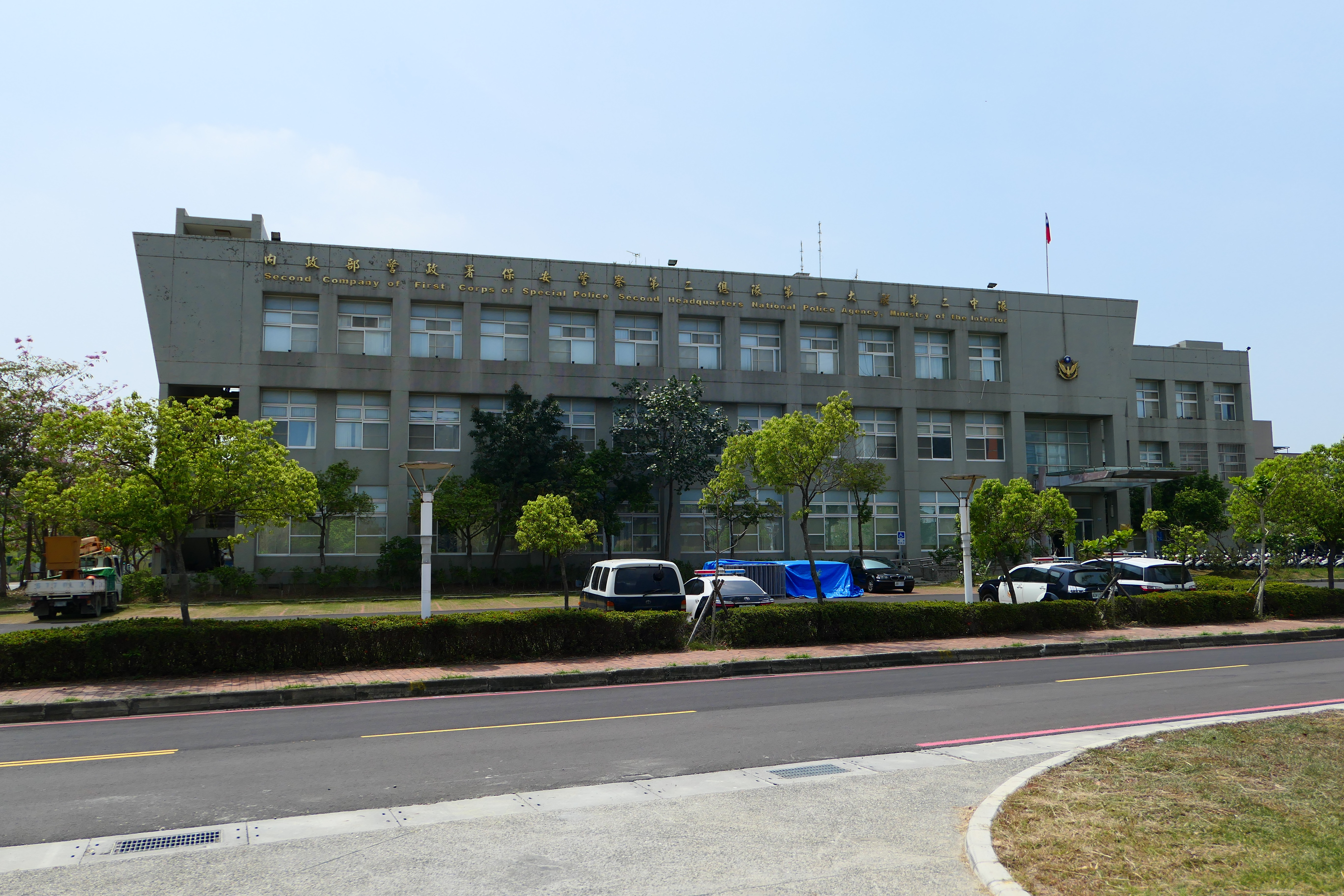 內政部警政署保安警察第二總隊第一大隊第二中隊隊部，位於南部科學工業園區，接近國立臺灣史前文化博物館南科分館。